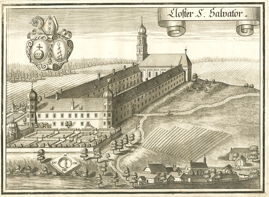 “Closter S. Salvator”, aus : Beschreibung des Churfürsten- u. Hertzogthumbs Ober- und Nidern Bayrn. Rentamt Landshut. – Gericht Griesbach, 1723